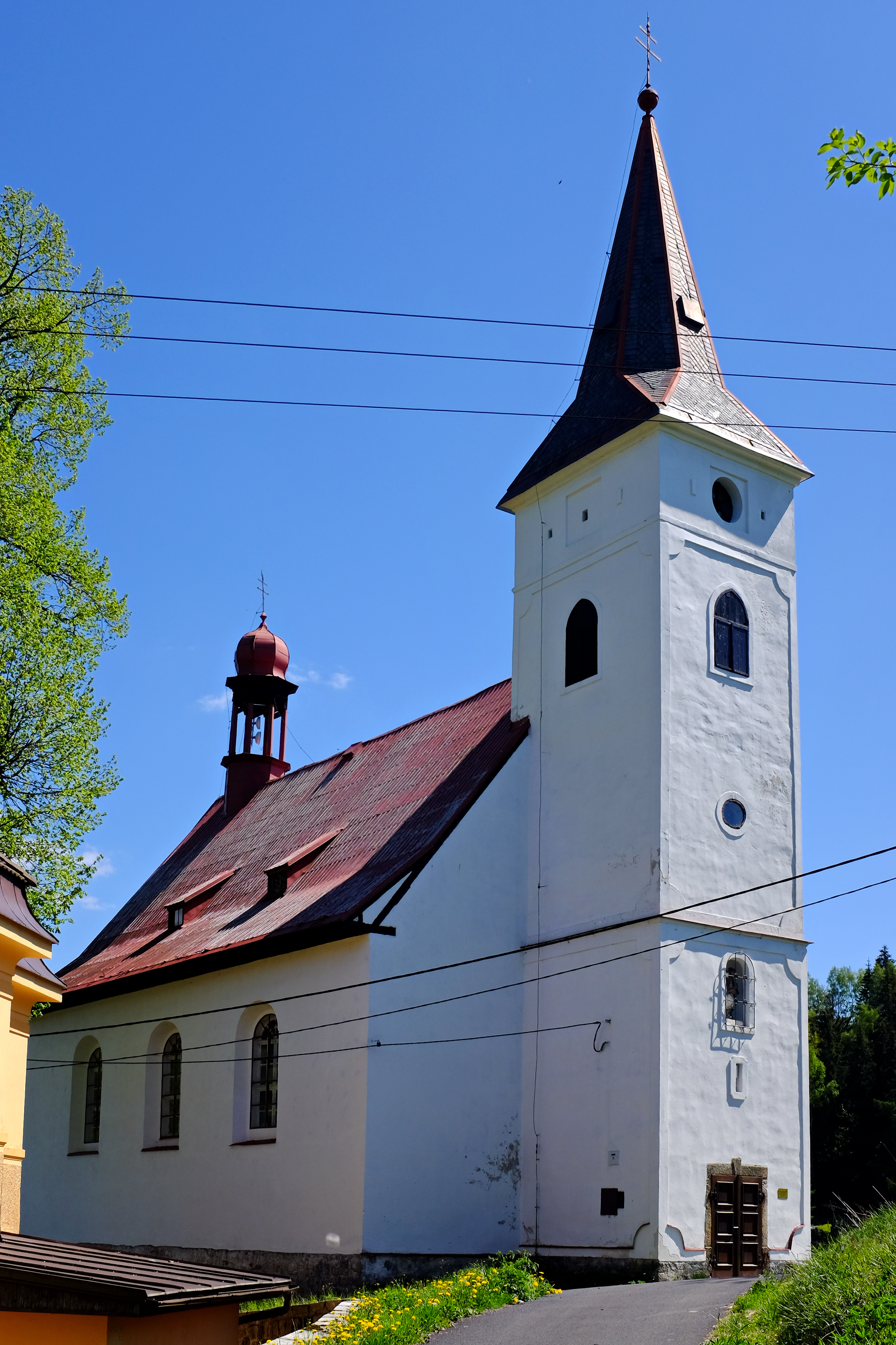 Kostel svatého Jana Nepomuckého, Nové Hamry.